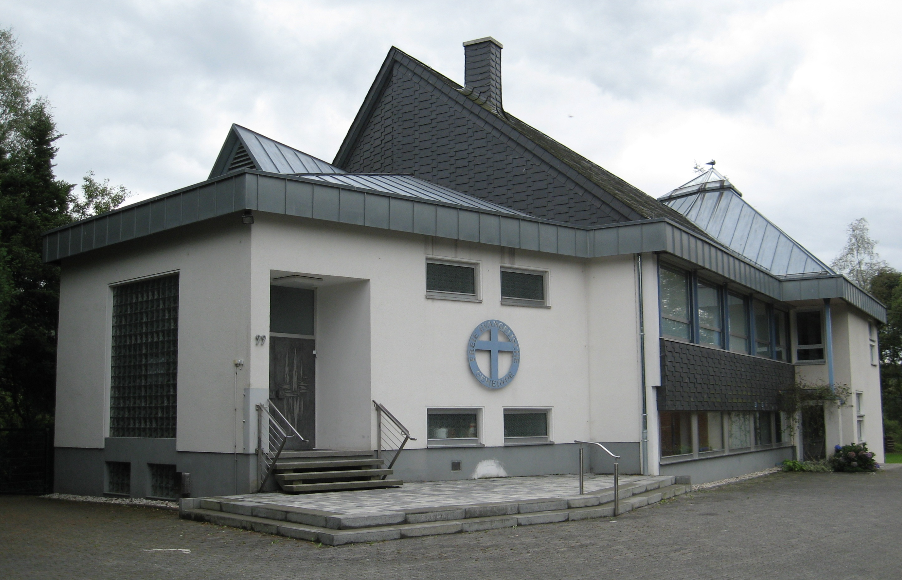 Freie evangelische Gemeinde Wilden. 1875 gegründet, war sie die erste FeG im Siegerland.